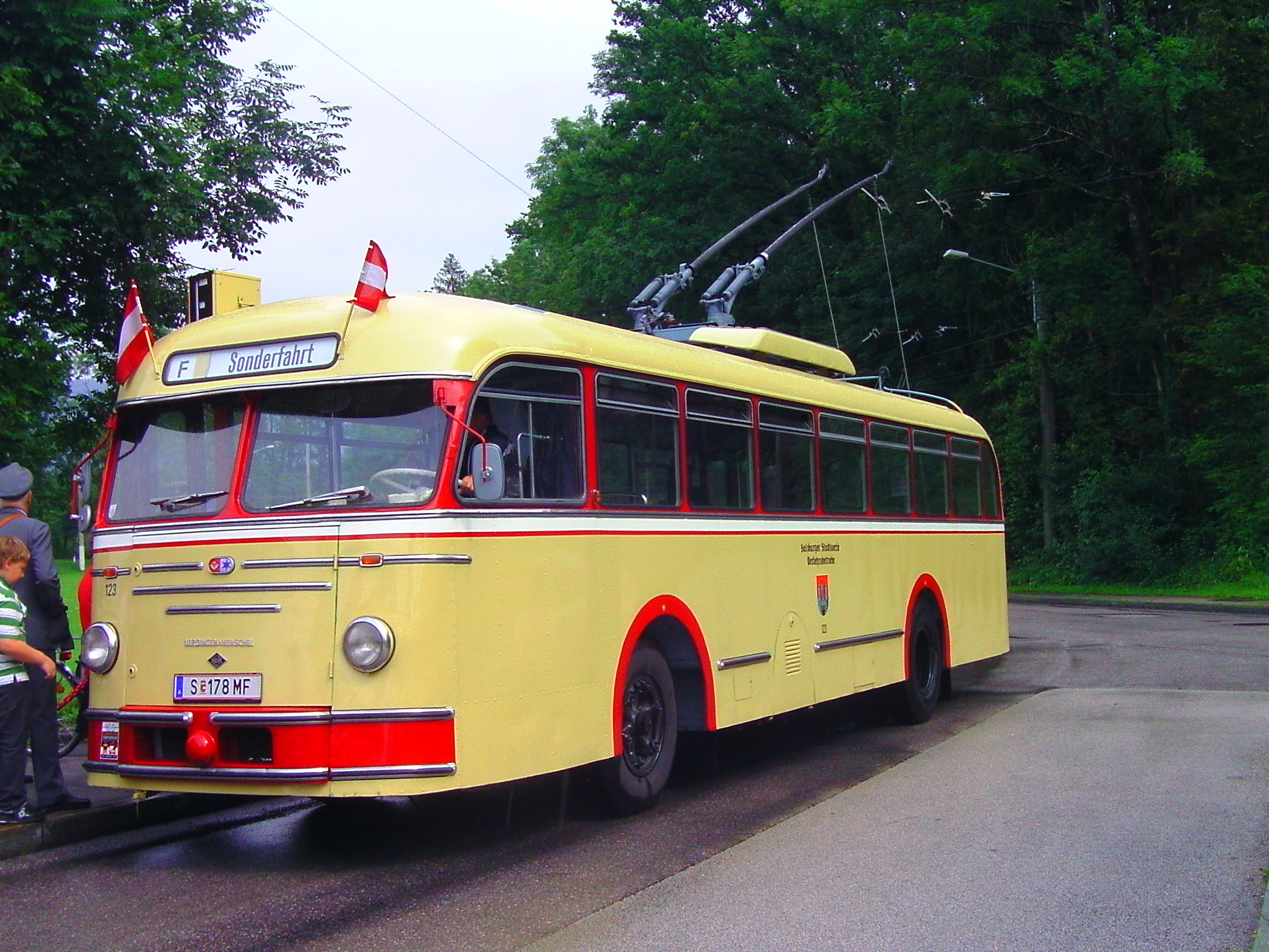 Historischer Obus 123 (Baujahr 1957) vom Typ ÜHIIIs